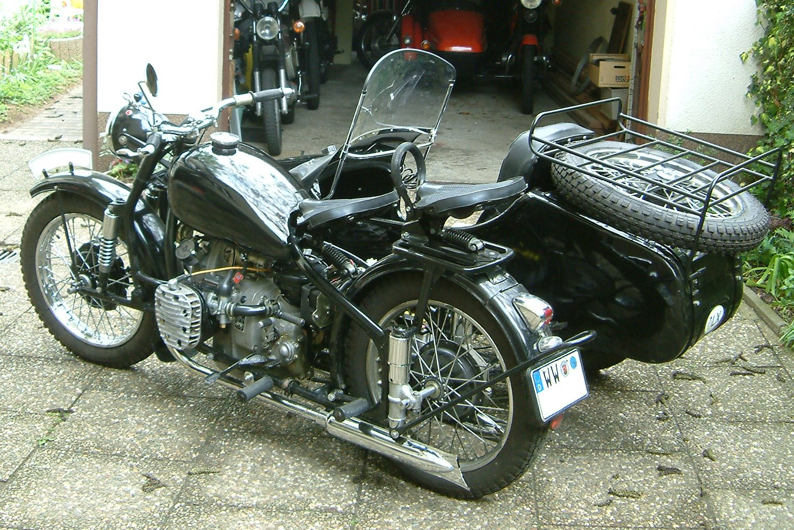 Chang Jiang M1M